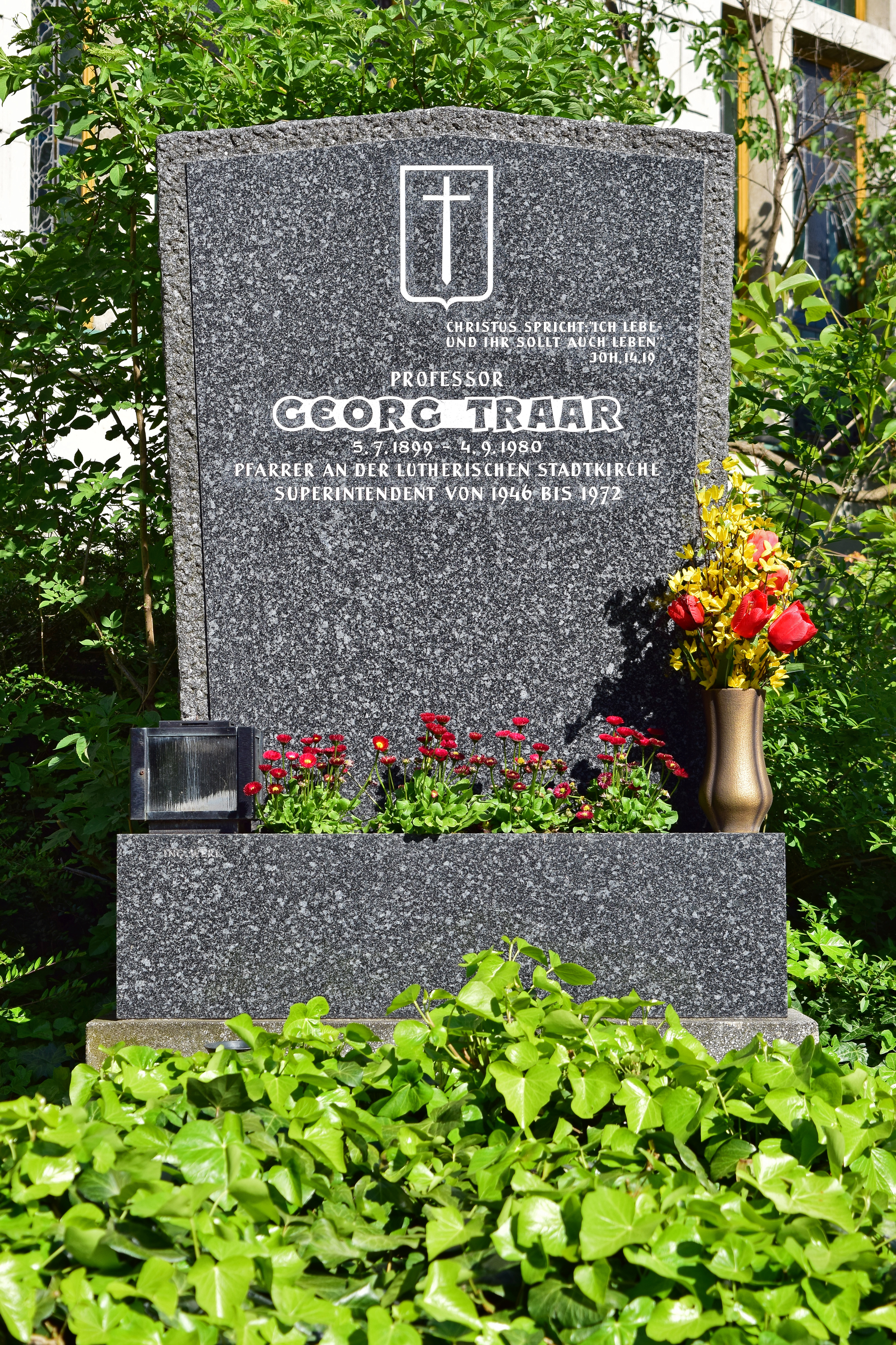 Ehrenhalber gewidmetes Grab von Georg Traar auf dem evangelischen Friedhof im Wiener Zentralfriedhof, Pfarrgräber, Nr. 1